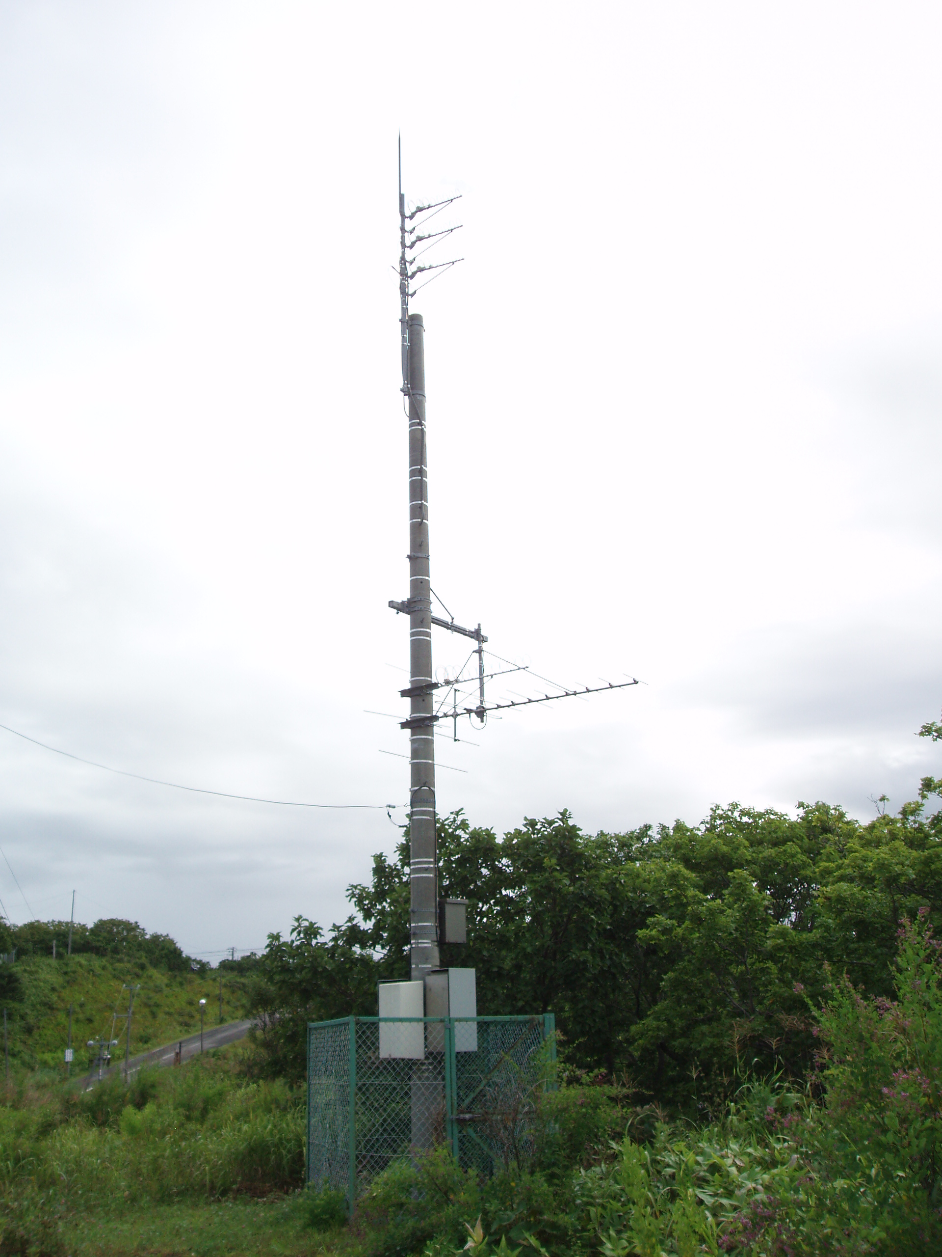 小平本町中継局